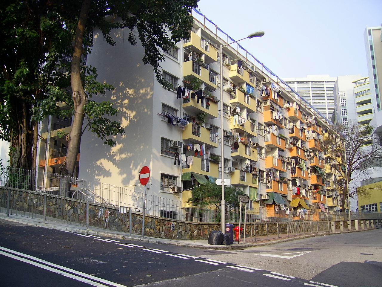 漁光邨順風樓